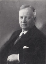 Bernhard Howaldt junior (* 9. Juni 1880 in Kiel; † 28. Juli 1958 in Flensburg) war ein norddeutscher Reeder und Unternehmer.